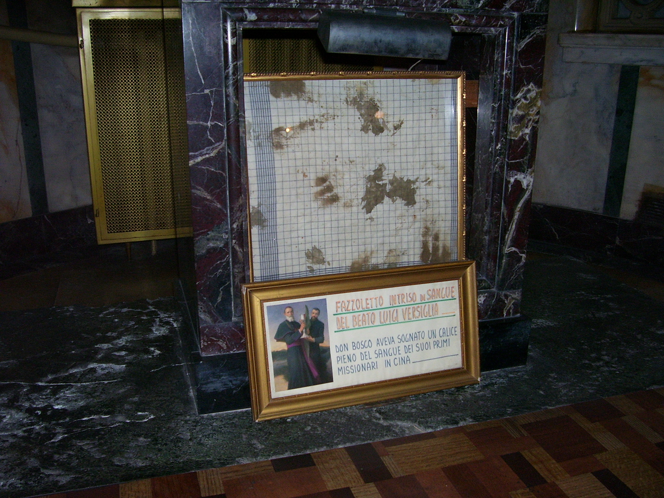 Pañuelo manchado de sangre perteneciente al mártir salesiano Luis Versiglia